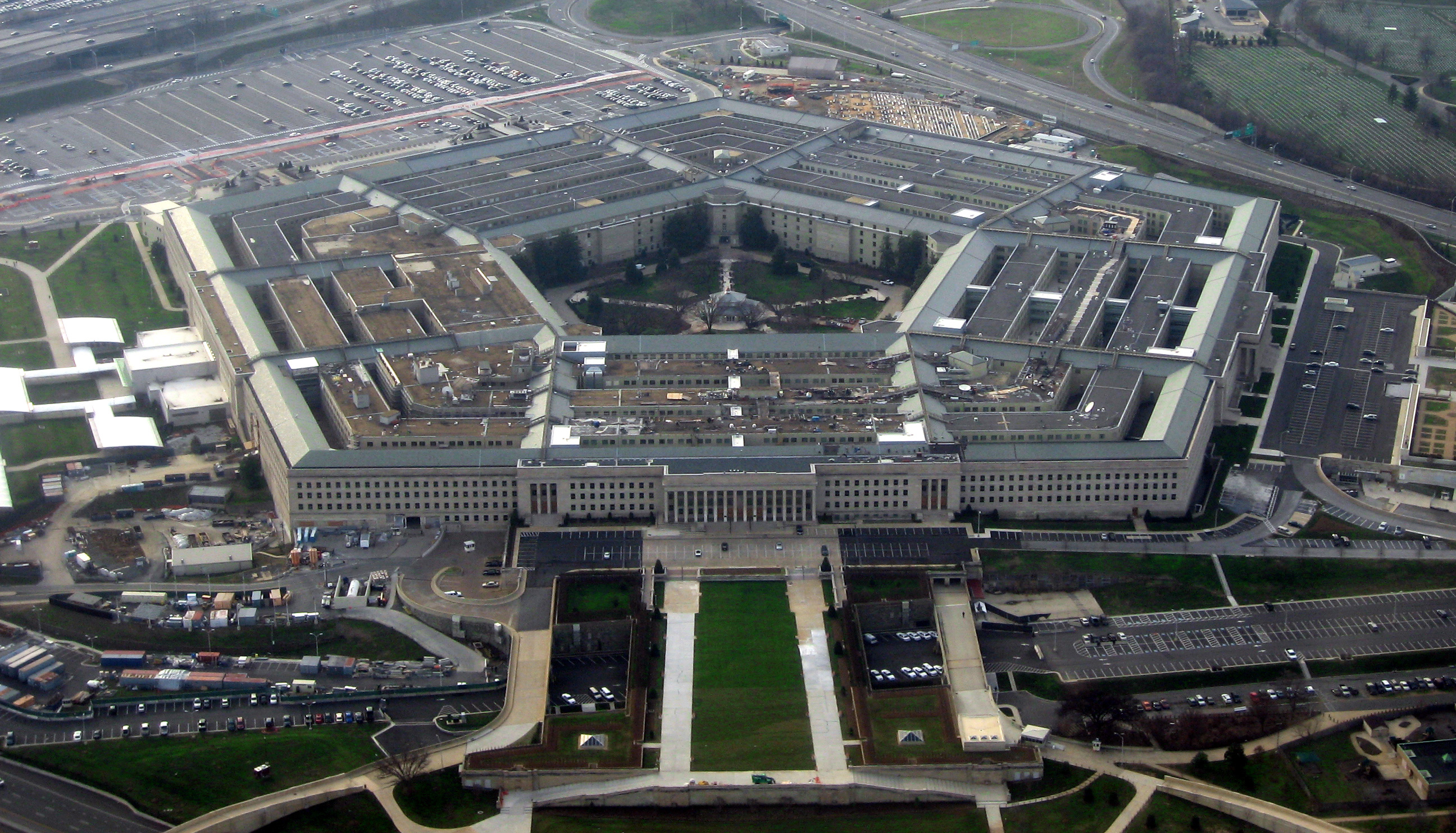 The Pentagon, headquarters of the United States Department of Defense, taken from an airplane in January 2008